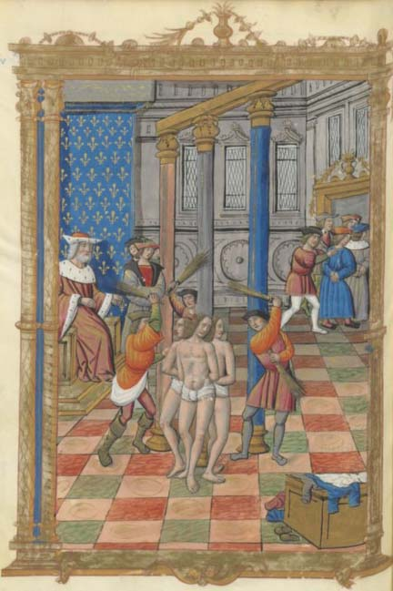 Saint Gontran punissant les envoyés. Guillaume Crétin, chroniques françaises, chapitre XXVII. Français 2818, fol. 86v. Rouen, XVIème siècle (après 1515).